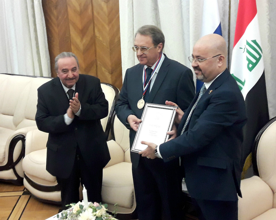 Д. Н. Хасан (слева) на вручении М. Л. Богданову (в центре) премии имени Науара. Справа посол Ирака в России д-р Хайдар Мансур Хади. Посольство Ирака в Москве, 28.09.2018.